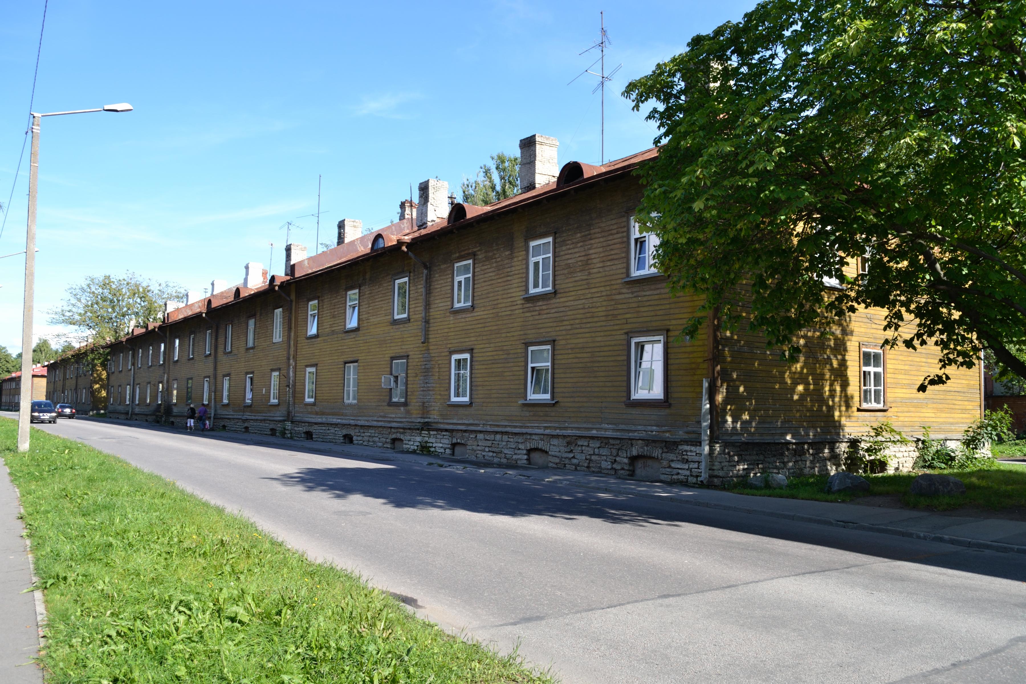 Tallinn, Balti Puuvillavabriku tööliselamu Sitsi 9, 1901-1905